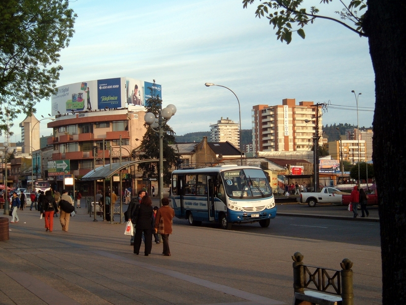 Plaza Teniente Dagoberto Godoy de la ciudad de Temuco, Chile. Vista hacia la calle Manuel Montt.